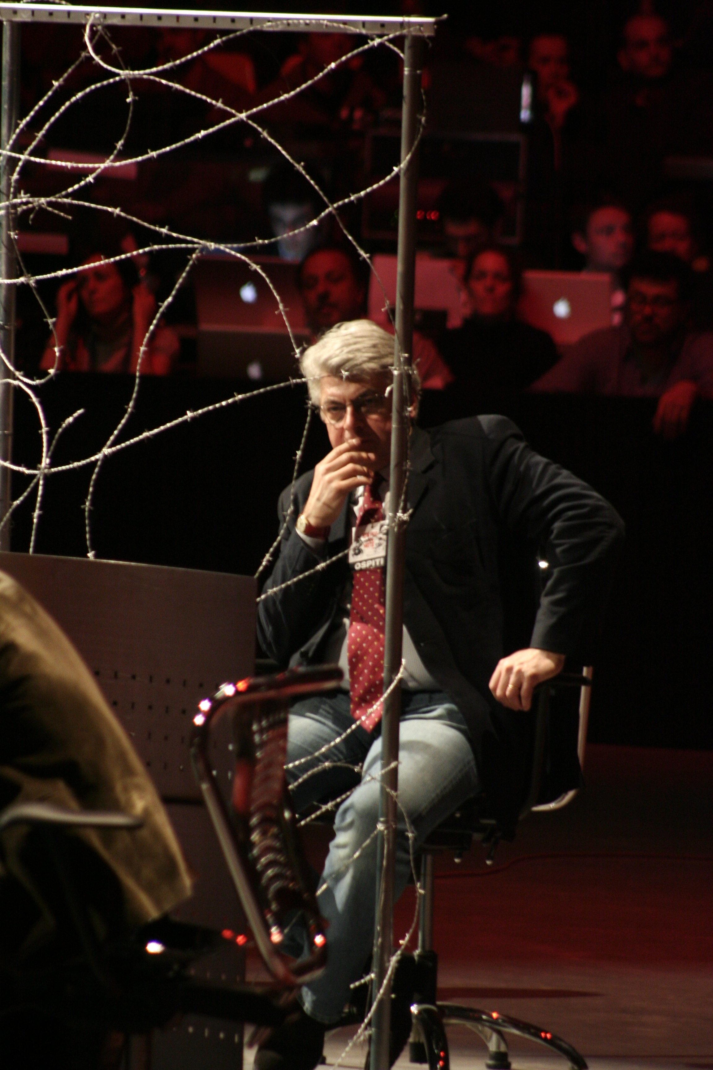 Loris Mazzetti a Rai per una notte. Speciale Anno Zero, contro la censura. Bologna.